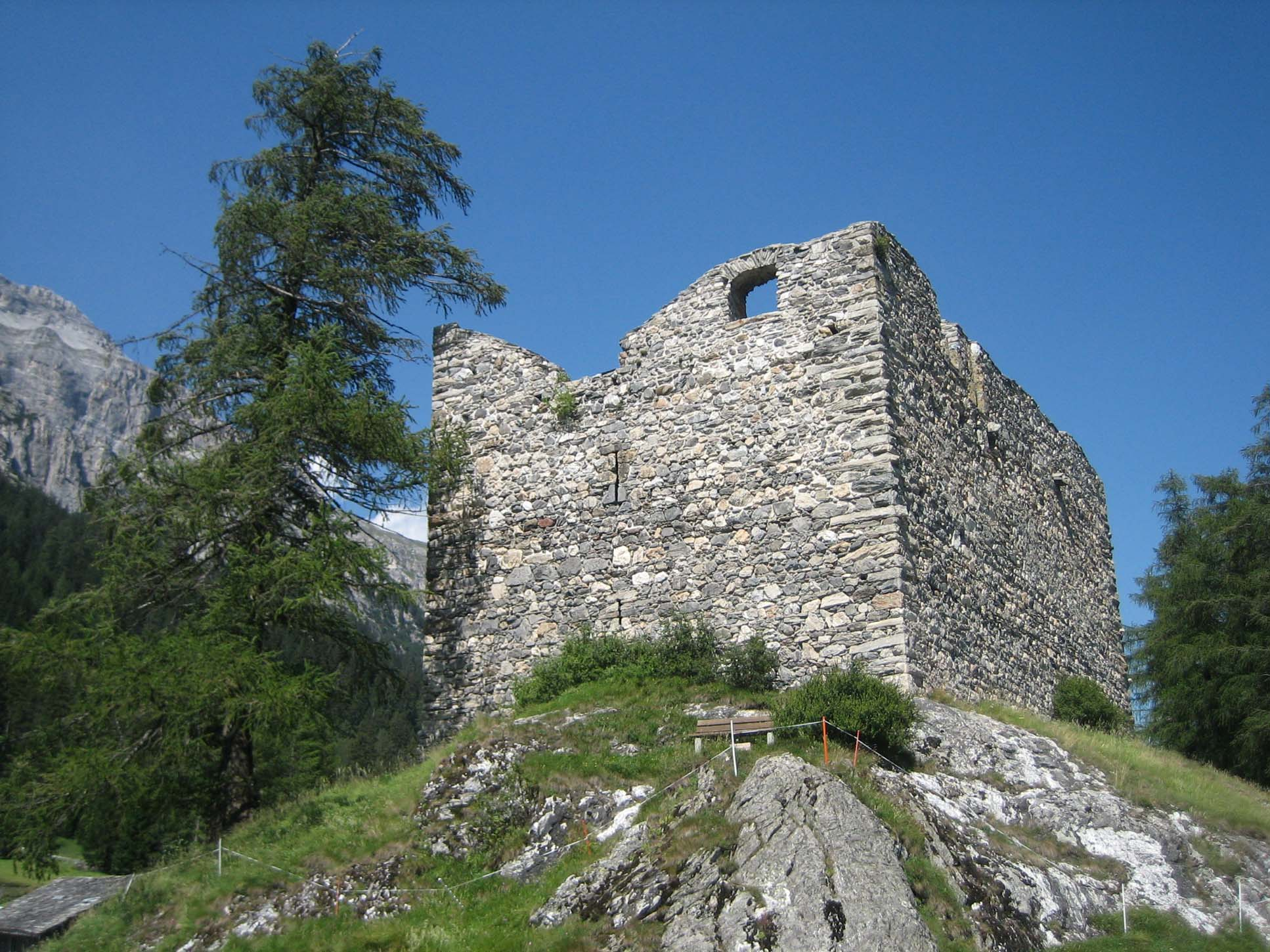 Burg Splügen, Ansicht von NW